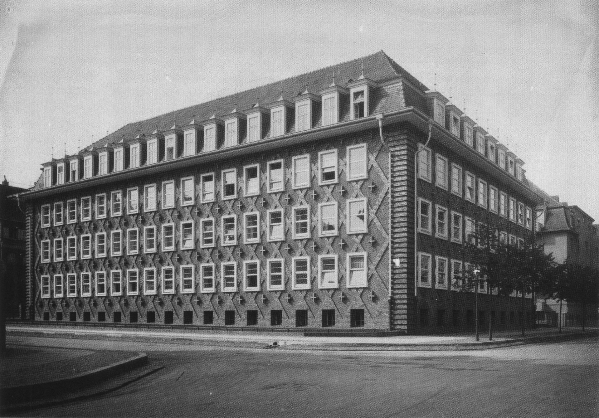 Haus der Barmenia Versicherungsanstalt in der Springerstraße 24. Architekt Emil Franz Hänsel. Ab 1946 Sitz des Mitteldeutschen Rundfunks mit dem Sender Leipzig.